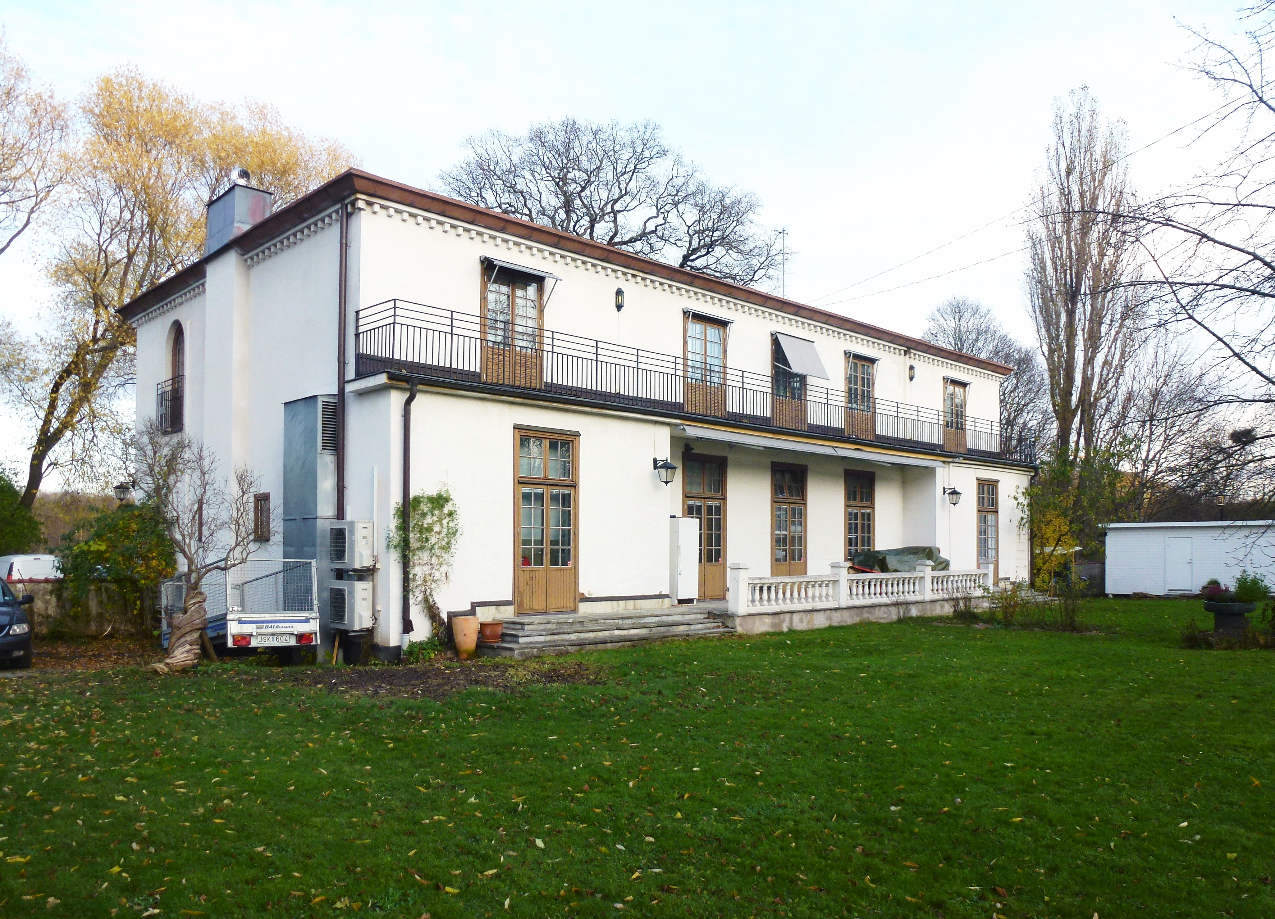 Fastigheten Svanen 1 i Solna, arkitekt Carl Åkerblad